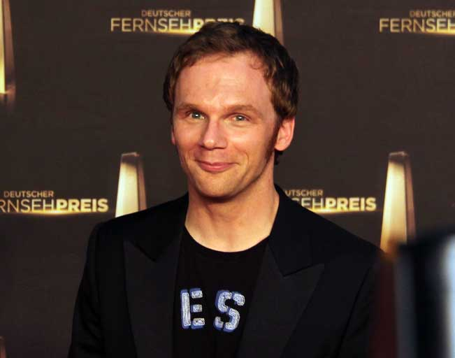 Ralf Schmitz beim Deutschen Fernsehpreis 2012